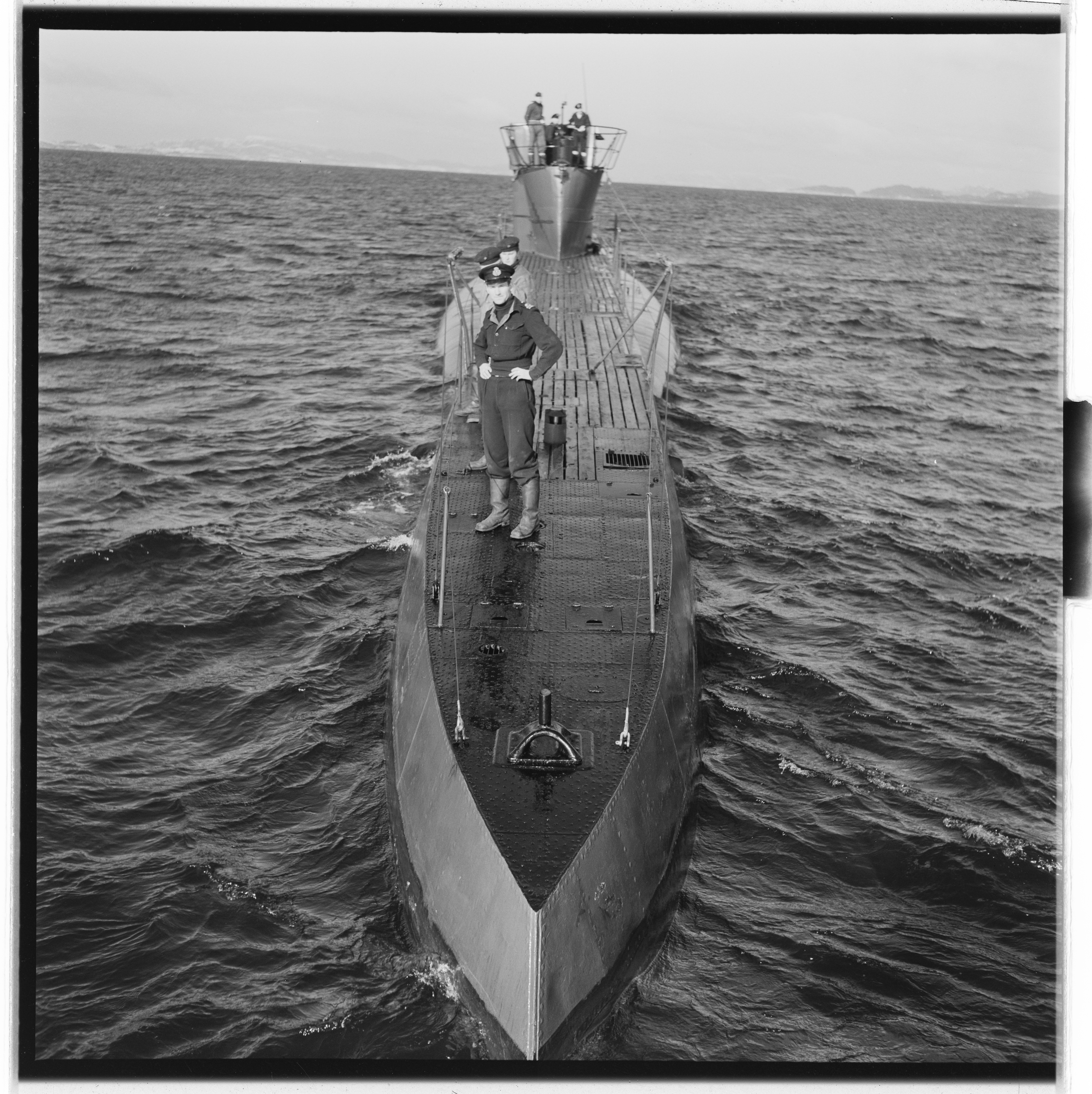 Bildet er hentet fra Arkivverket. Ubåt, K.N.M. Kya. NÅ nr. 17, 1955 Arkivinstitusjon : Riksarkivet Arkivnavn : Billedbladet NÅ Sted : Norge, Ukjent, Ukjent, Ukjent Emneord: Ubåter, Menn, Maritimt Avbildet